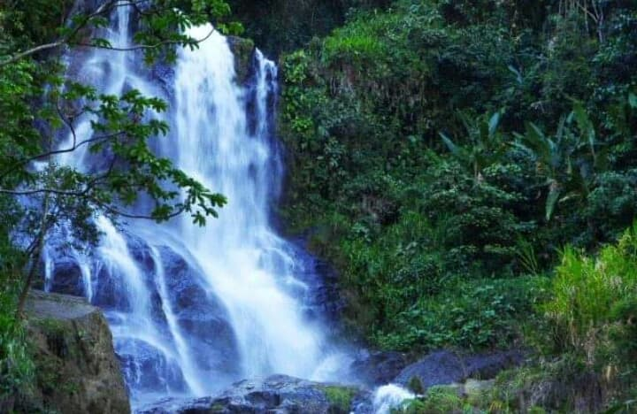 Casabianca es un pueblo con hermosos paisajes, atardeceres increíbles., allí muy cerca se encuentra el nevado del ruiz, sus costumbres son muy cafeteras así que encuentras dos tipos de paisajes el hermoso páramo y sus bellos cafetales, gran variedad de fauna y flora. Esta fotografía fue tomada en un área protegida de Colombia con el no enlistada código área no enlistada del RUNAP.